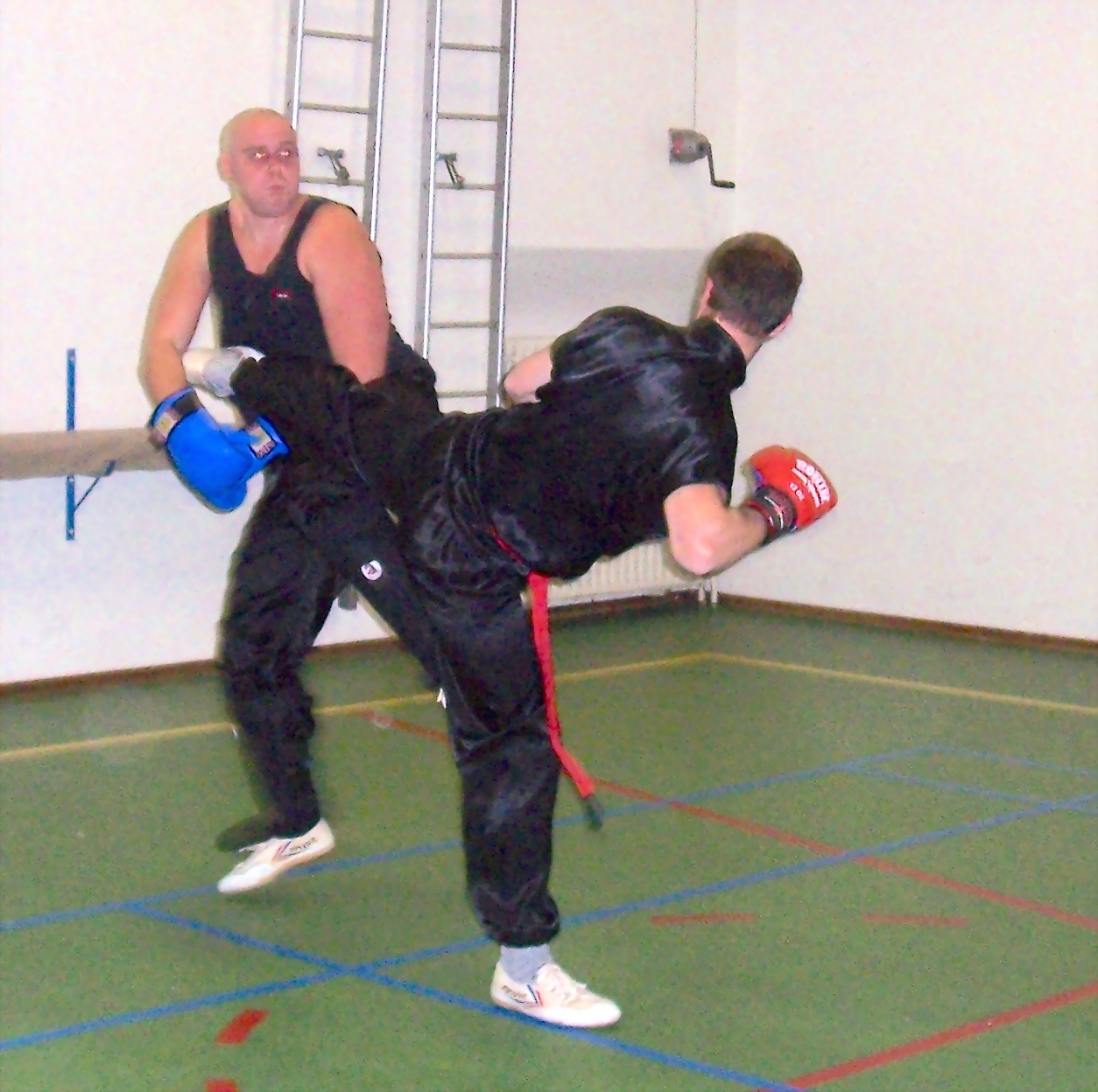 Sanshou (San da) - goed geplaatste trap bij oefengevecht. (gebruikte bescherming: bitje, scheenbescherme en toq) 4 dec. 2006 Hong Ying Katwijk. Sifu Tony Wittebol + student.